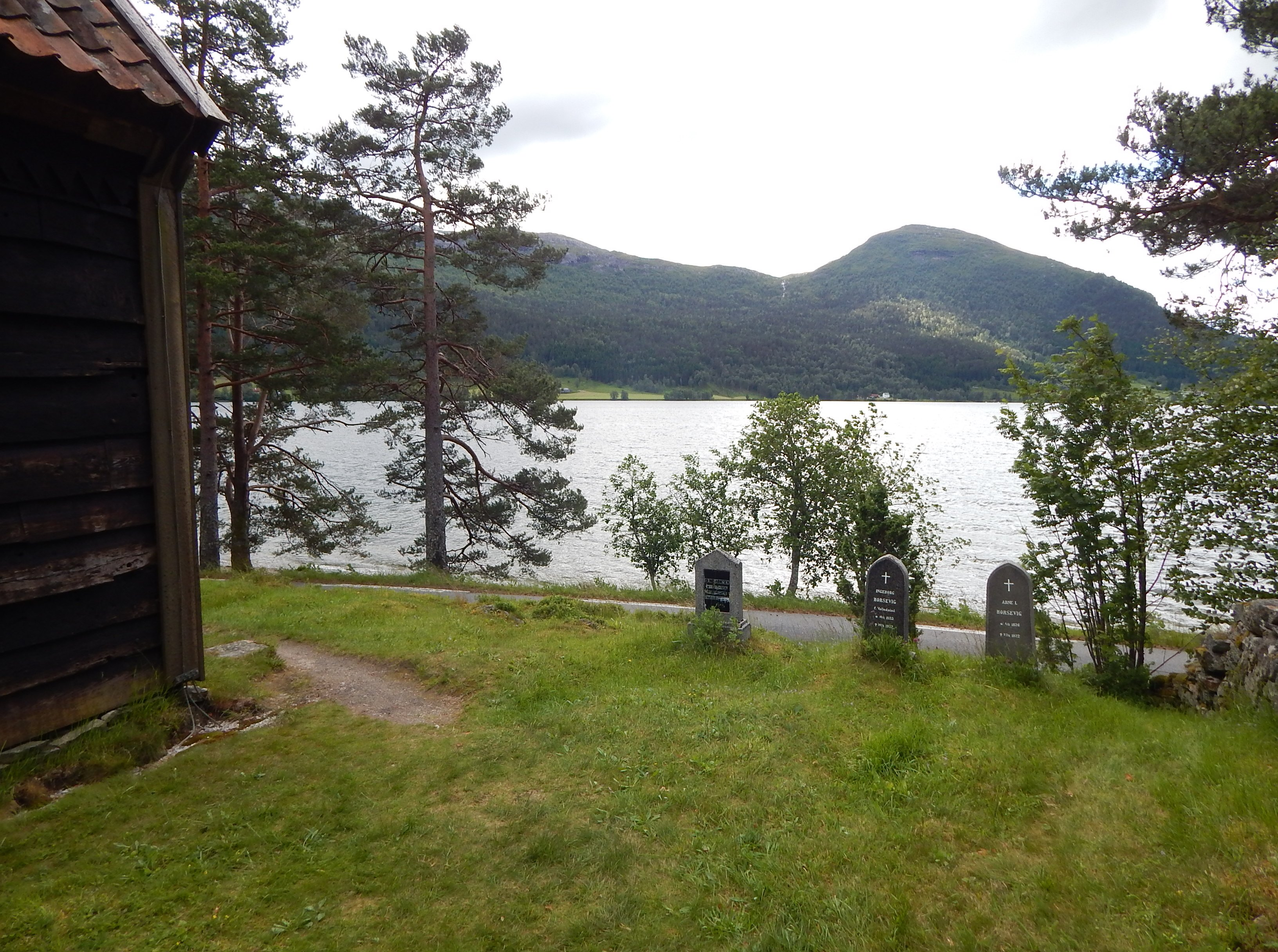 Hestadfjorden ved Hestad kapell